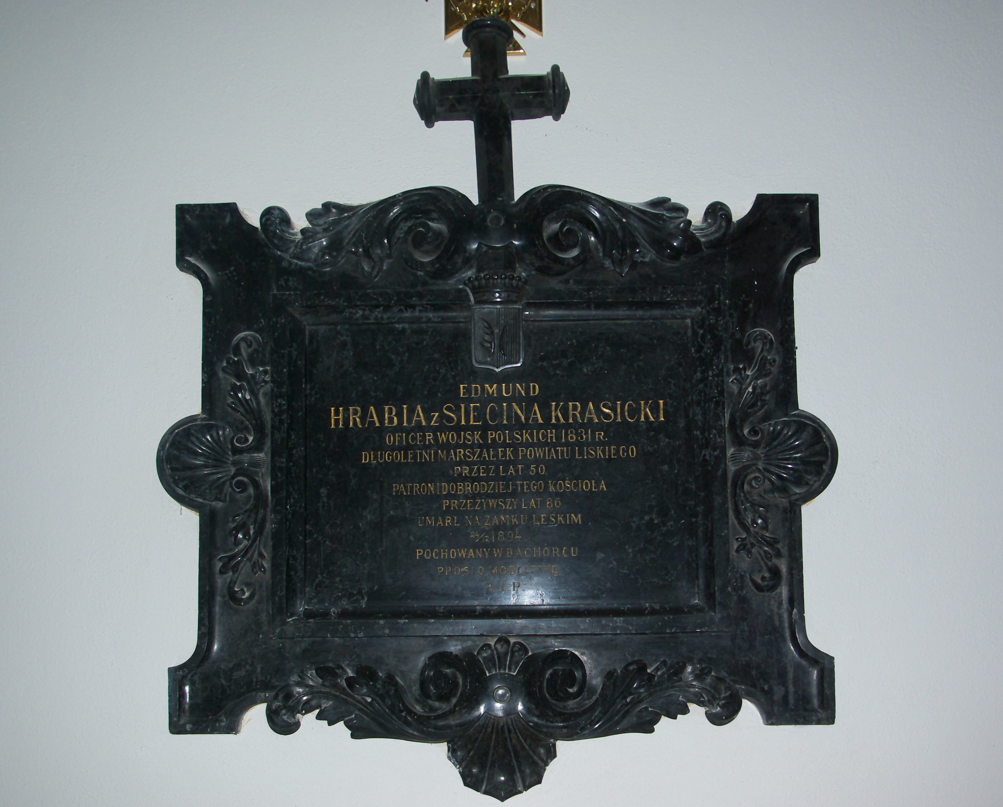 Epitafium Edmunda Krasickiego w kościele Nawiedzenia Najświętszej Maryi Panny w Lesku.